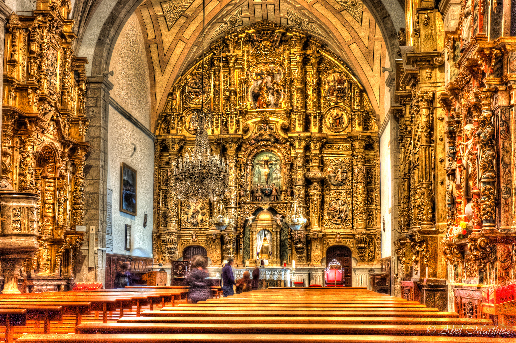 500px provided description: Iglesia De Luanco [#hdr ,#asturias ,#Luanco]